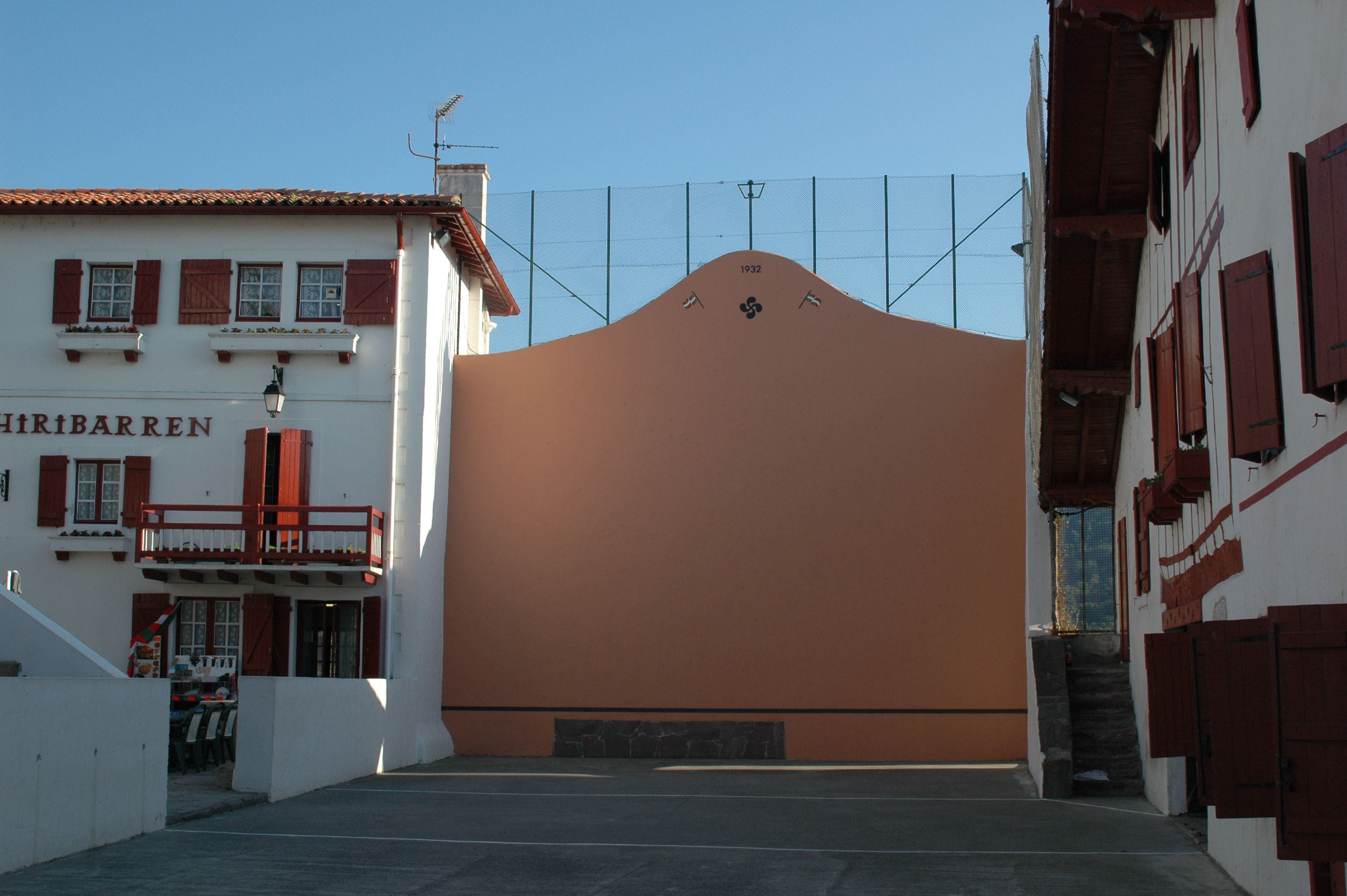 Biriatou, le fronton place libre